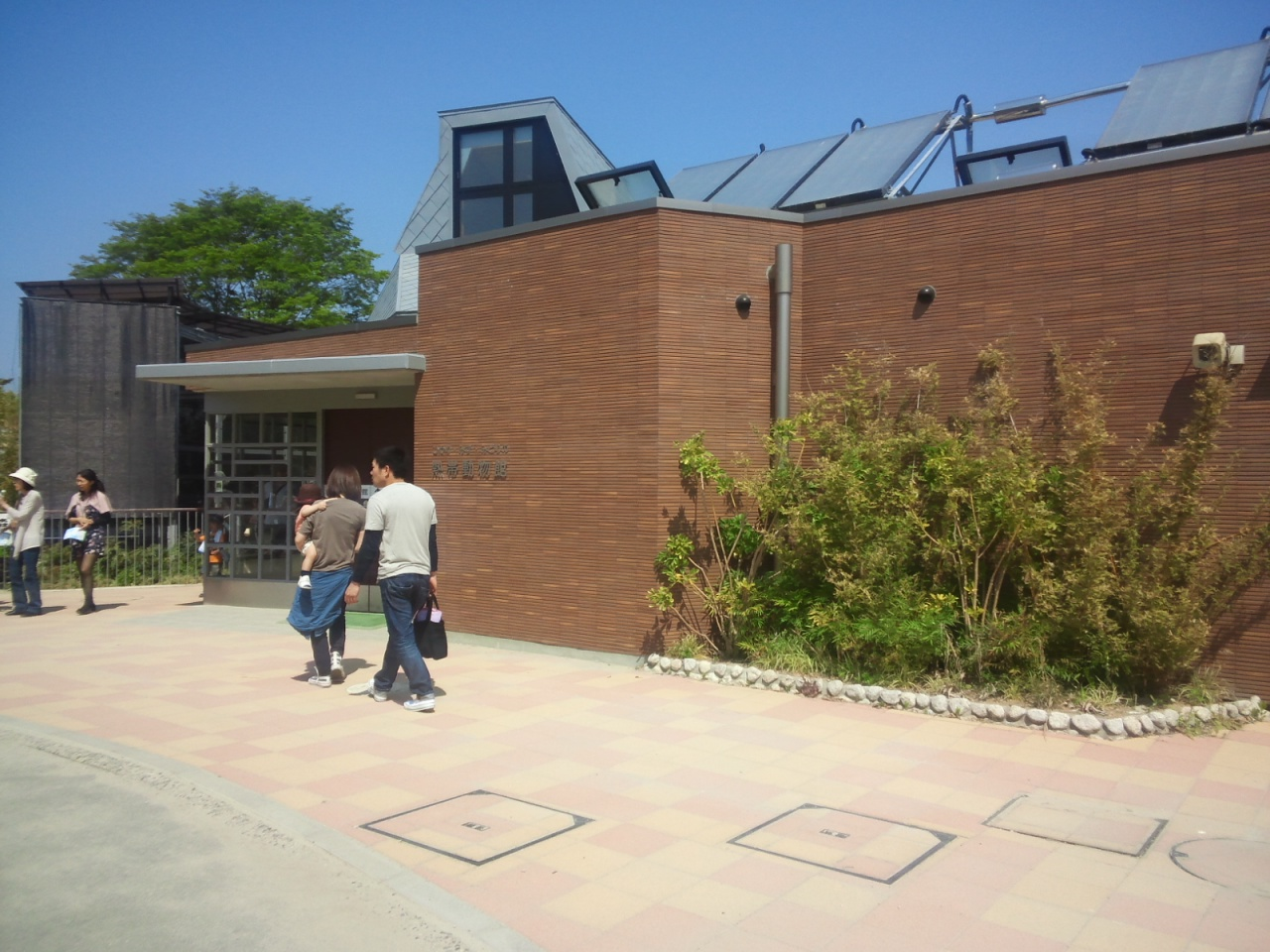 京都市動物園 - 熱帯動物館